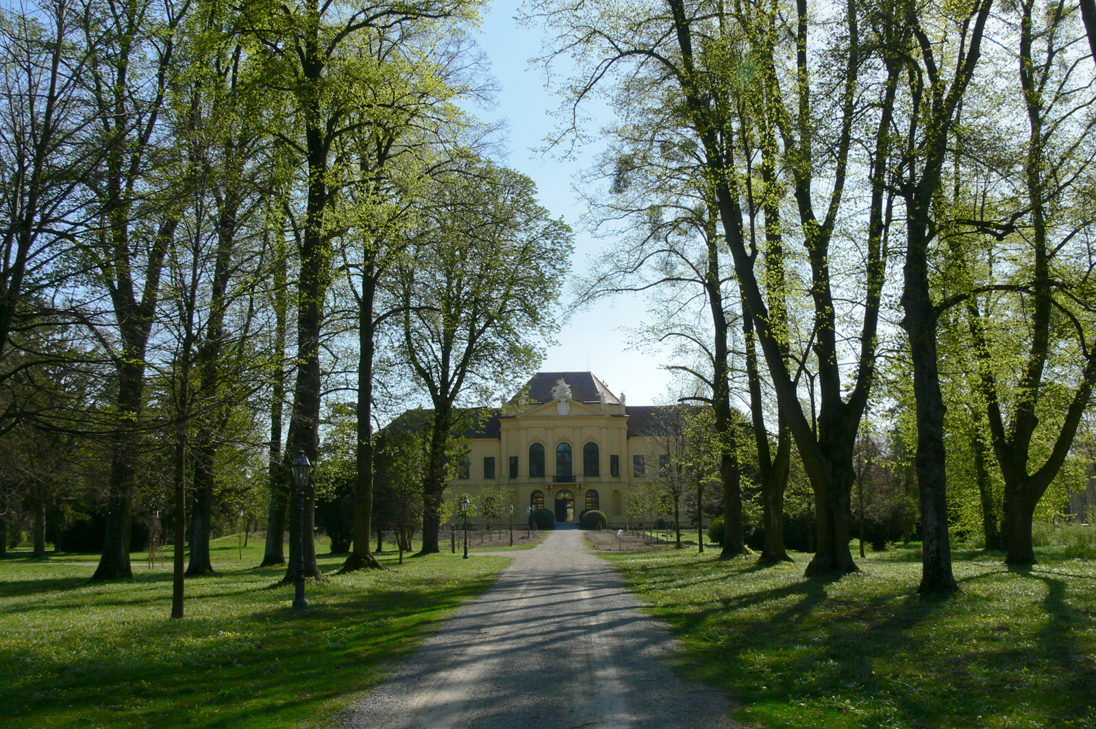 Schloss Eckartsau